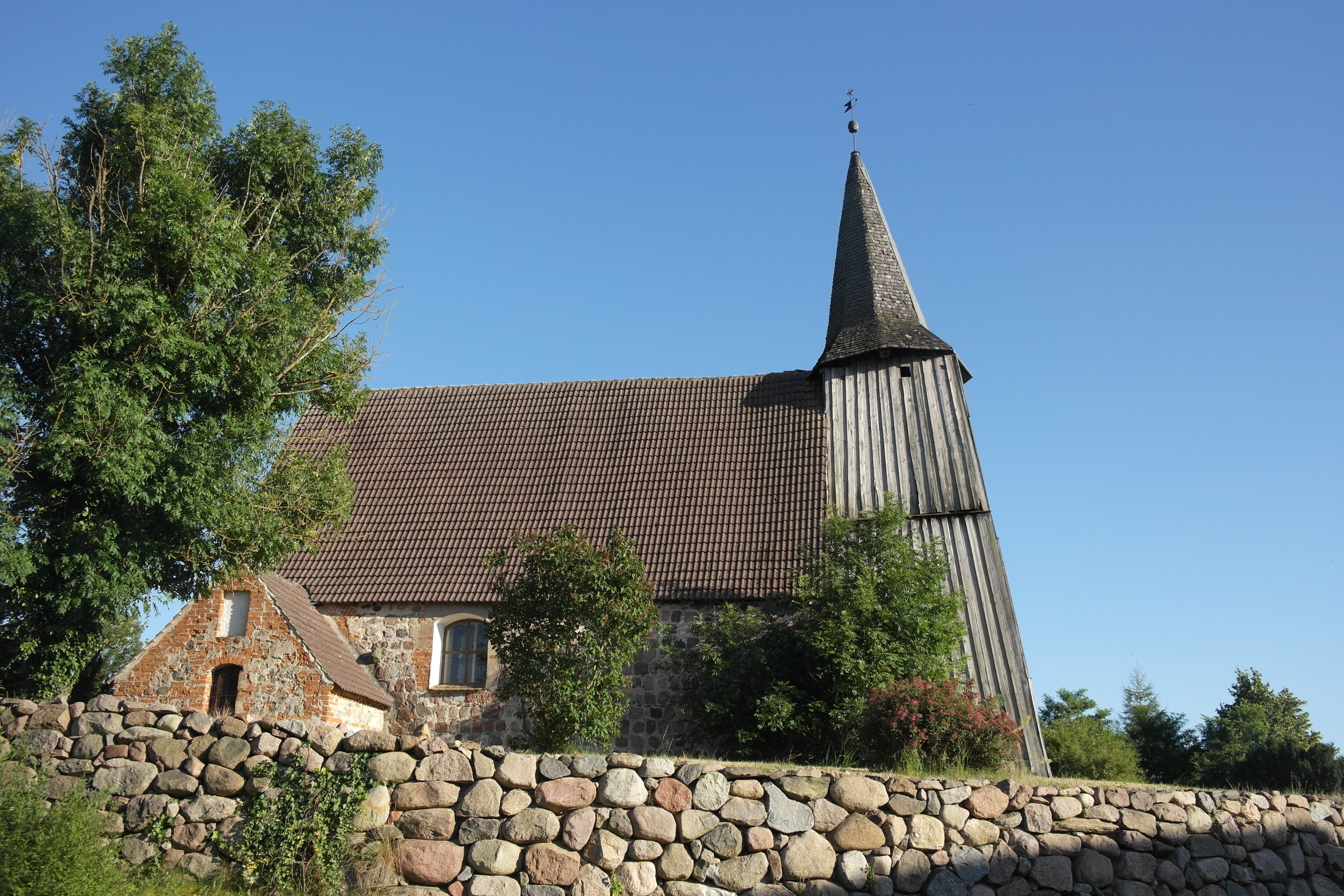 Denkmalgeschützte Kirche von Cammin (Meckl)